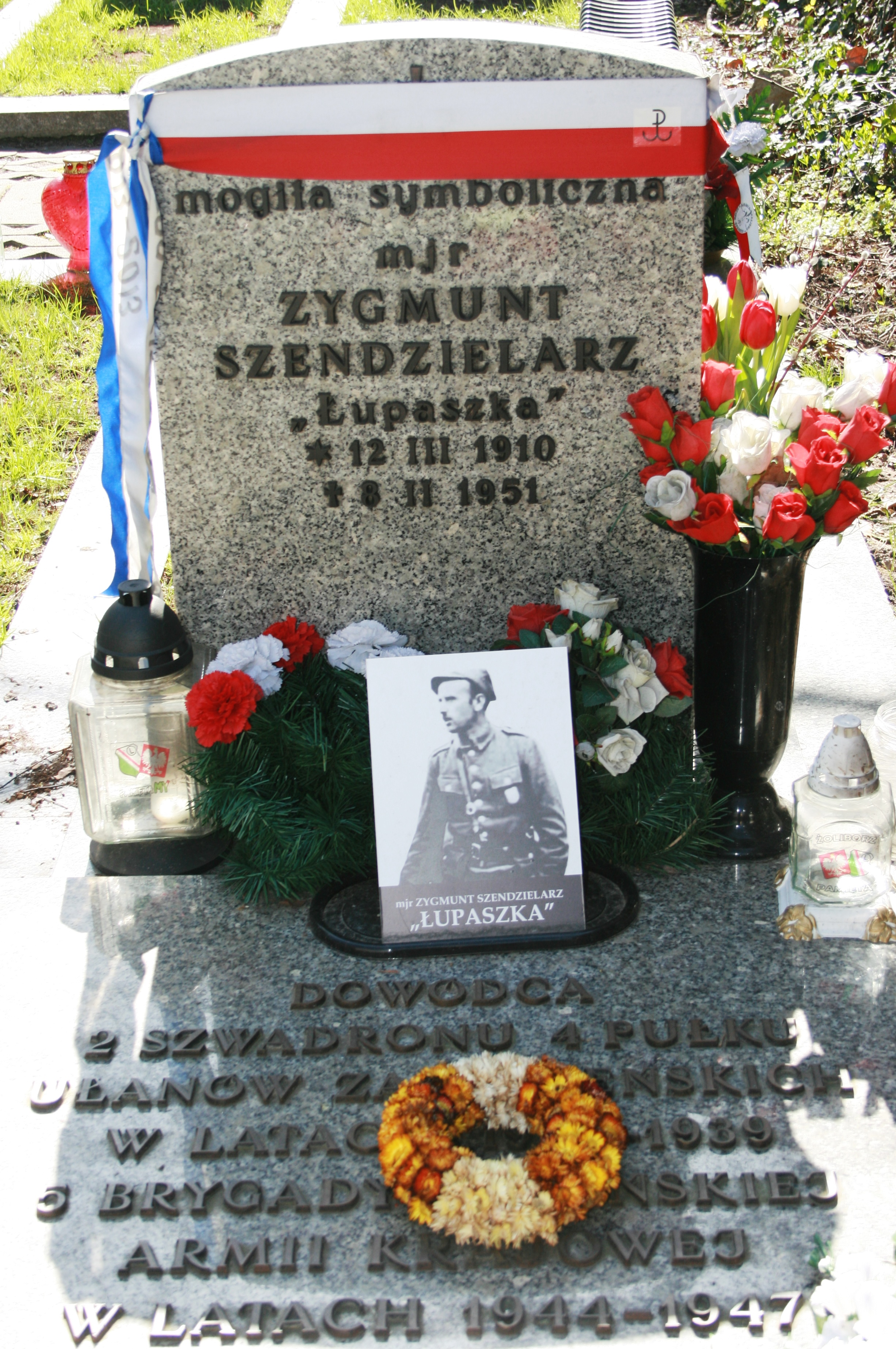 Grób w Panteonie Żołnierzy Polski Walczącej (kwatera D18) na Cmentarzu Wojskowym w Warszawie